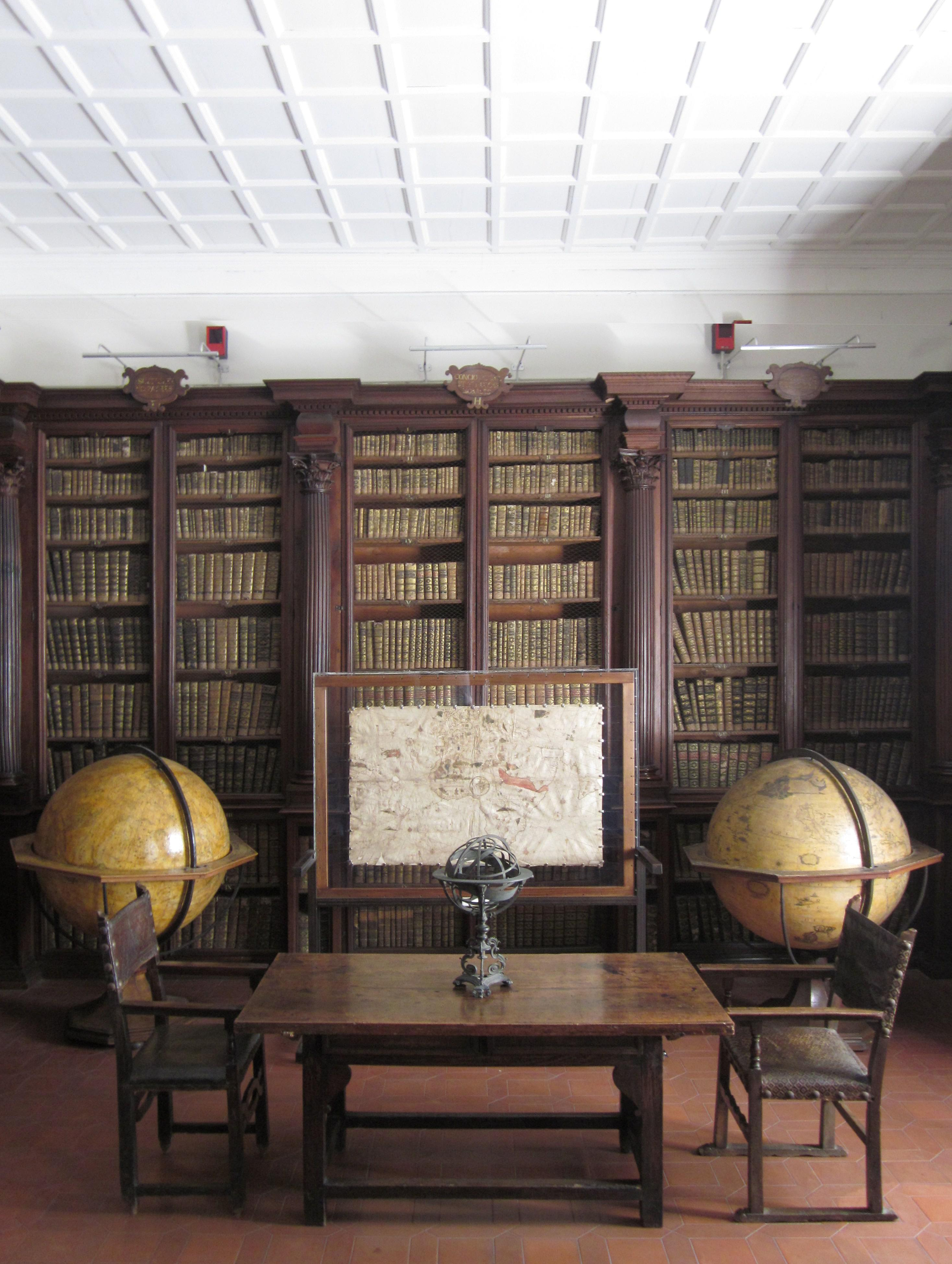 Immagine della Sala dei Globi, Biblioteca Federiciana di Fano. La sala è così denominata per la presenza di una coppia di globi realizzati da Vincenzo Maria Coronelli (1688); vi sono conservati parte dei volumi donati da Domenico Federici ed alcuni cimeli della Biblioteca Federiciana, tra cui il Portolano del Vesconte Maggiolo (1504).